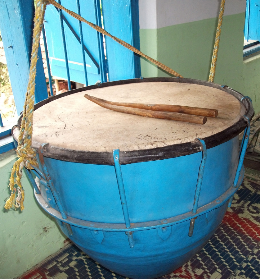 മുസ്്‌ലിം പള്ളികളില്‍ ബാങ്കിന്റെ സമയം അറിയിക്കാന്‍ ഉപയോഗിച്ചിരുന്ന ഉപകരണമാണിത്‌